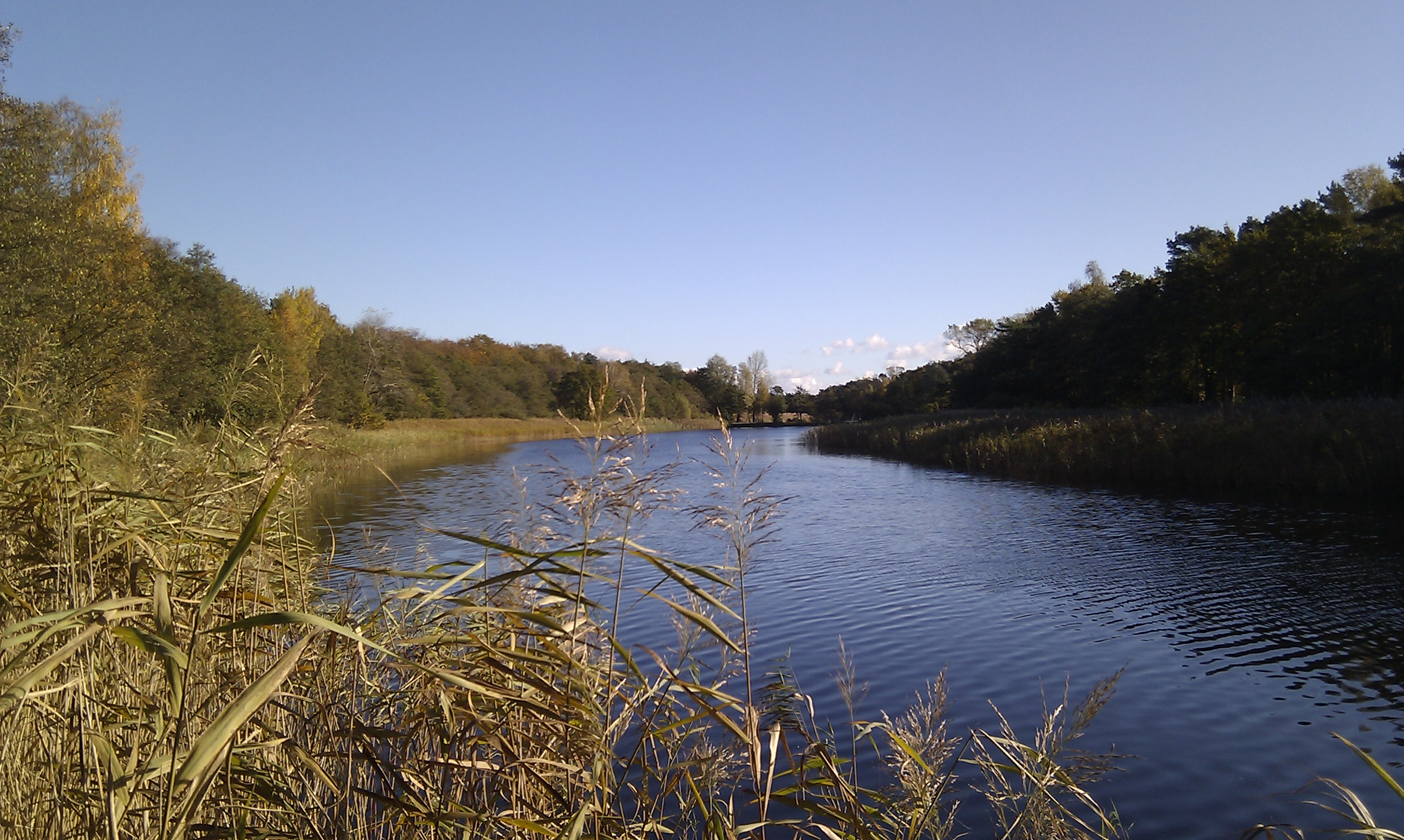 Prerow